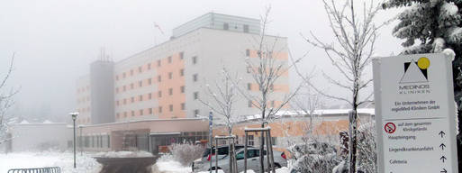 Medinos Klinik Neuhaus am Rennweg, Bettenhaus